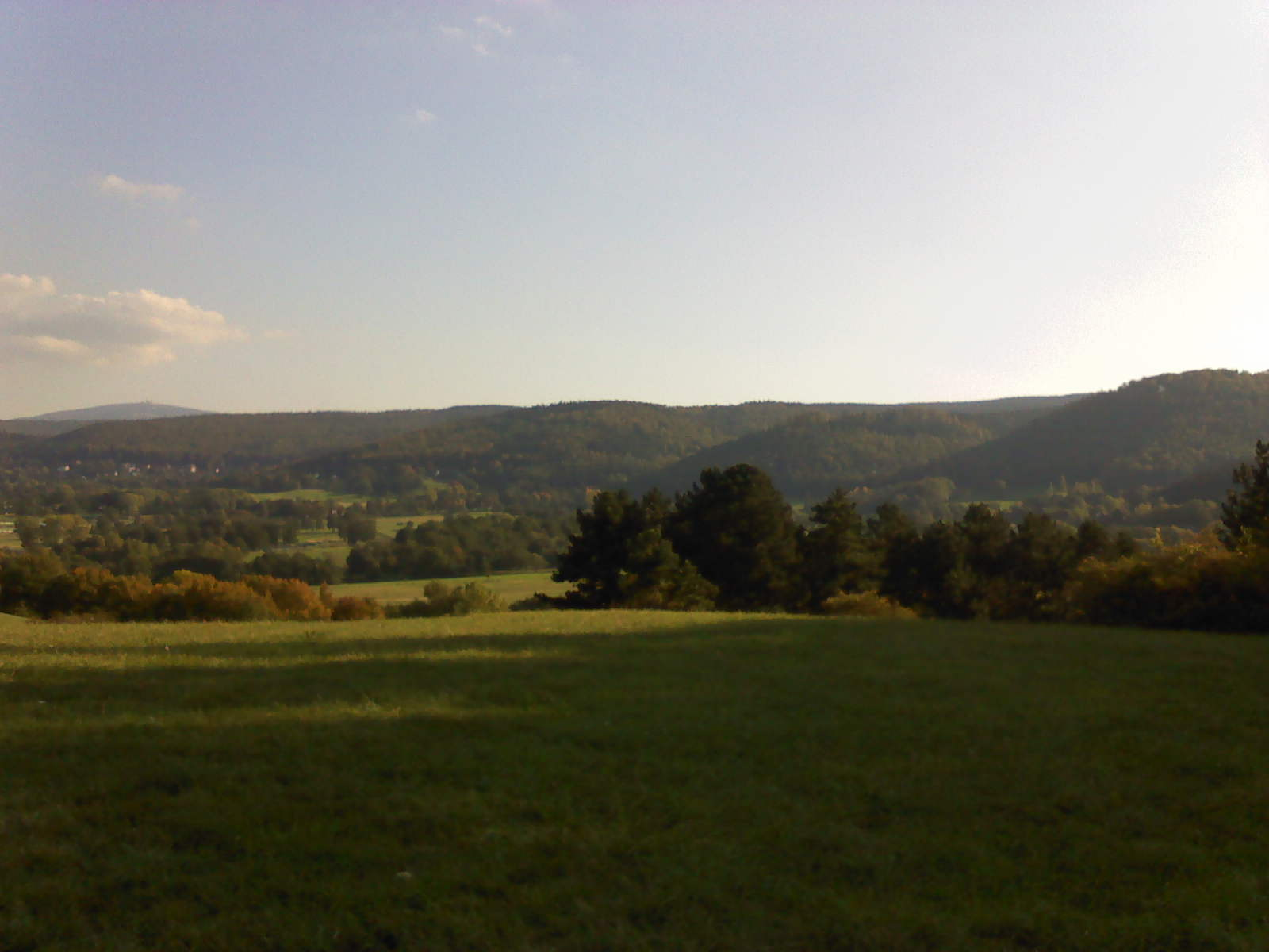 Bild vom Langenberg; der östliche Langenberg, am Südhang; Teilbereich im Naturschutzgebiet „Östlicher Langenberg“